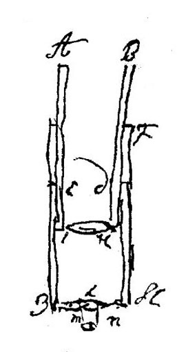 Катоптрыка-диоптрическая запальная сістэма або "Ночаглядзельная труба"